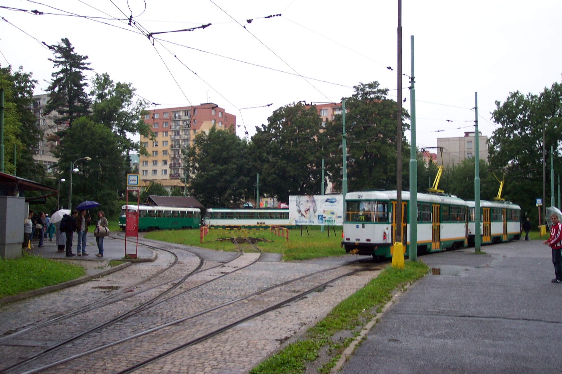 Jablonec nad Nisou, Tyršovy sady, konečná meziměstské trati Liberec – Jablonec